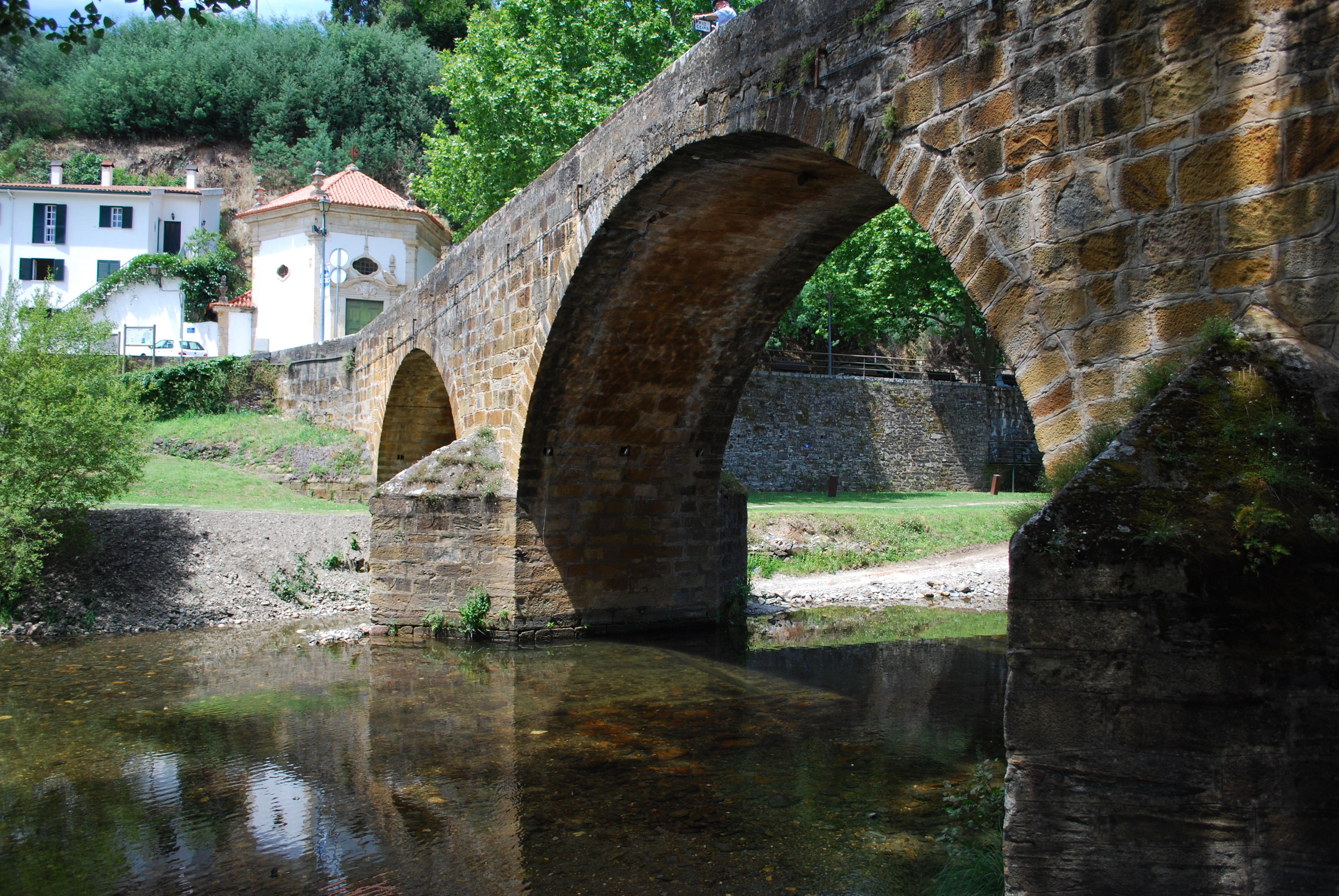 Ponte sobre o Rio Ceira e capela hexagonal a sul This file was uploaded for Wiki Loves Monuments in Portugal with the unique identifier 69763.